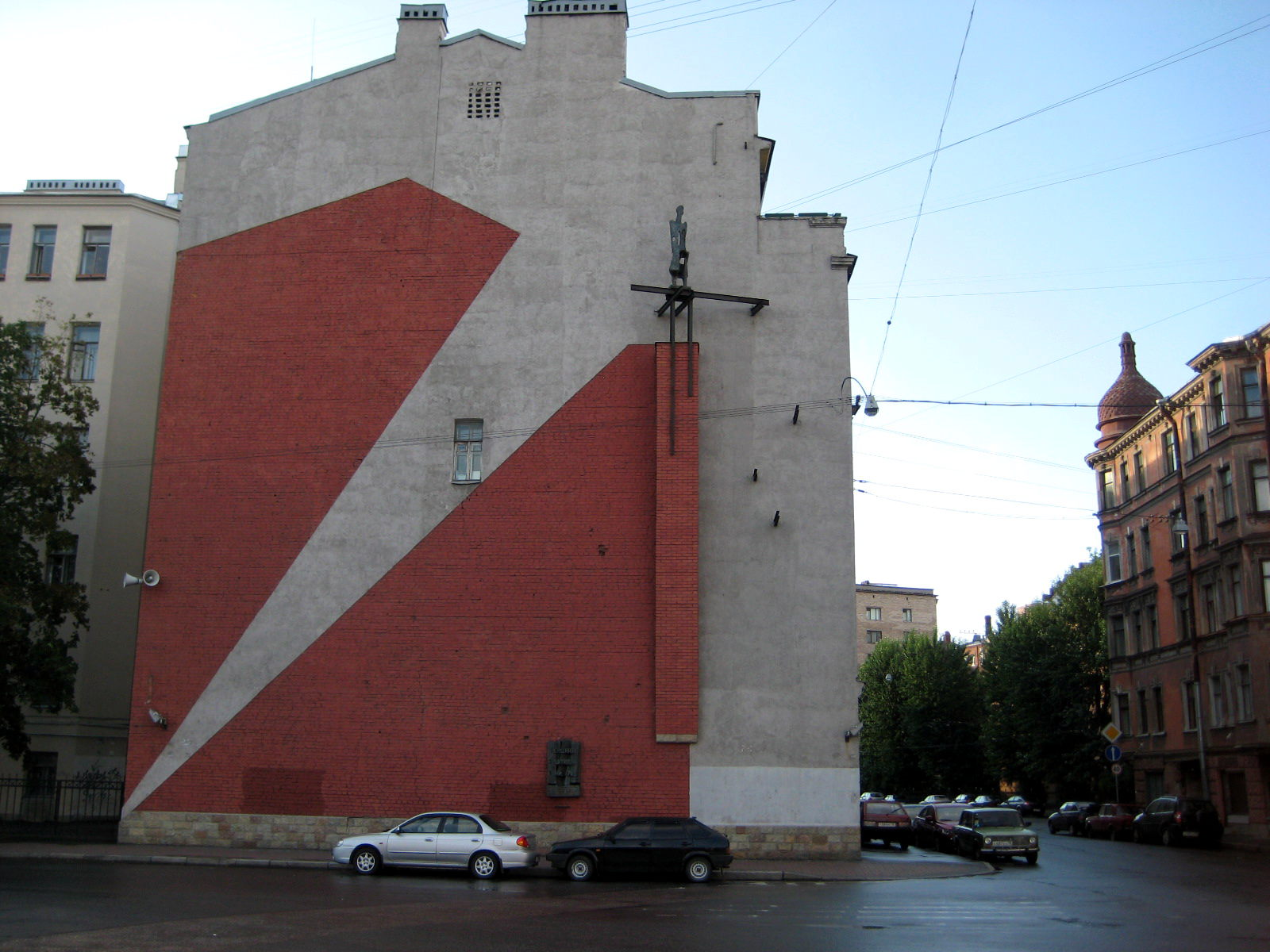 Женщинам